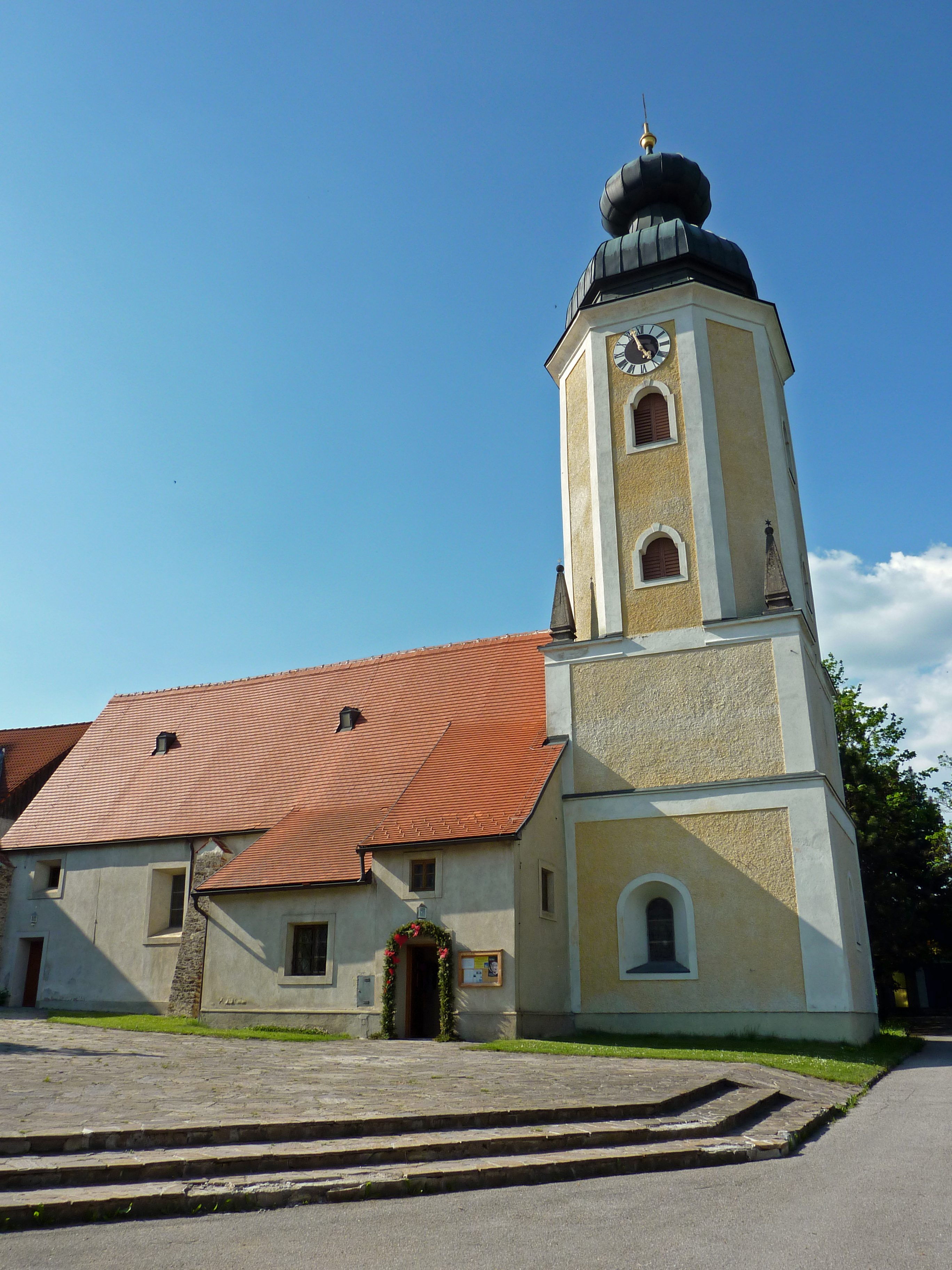 Pfarrkirche Sallingberg, Niederösterreich